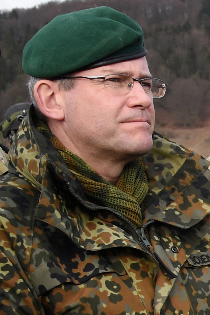 Brigadegeneral André Bodemann